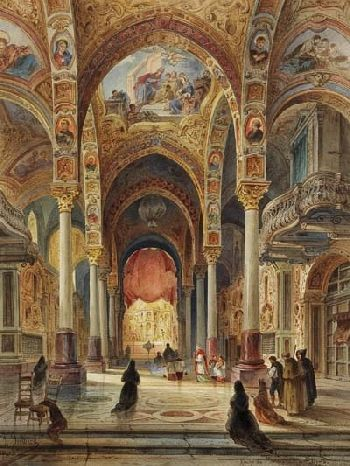 Chiesa Santa Maria dell'Ammiraglio (also known as La Martorana), Palermo Watercolours and pencil, 57 x 42.8 cm